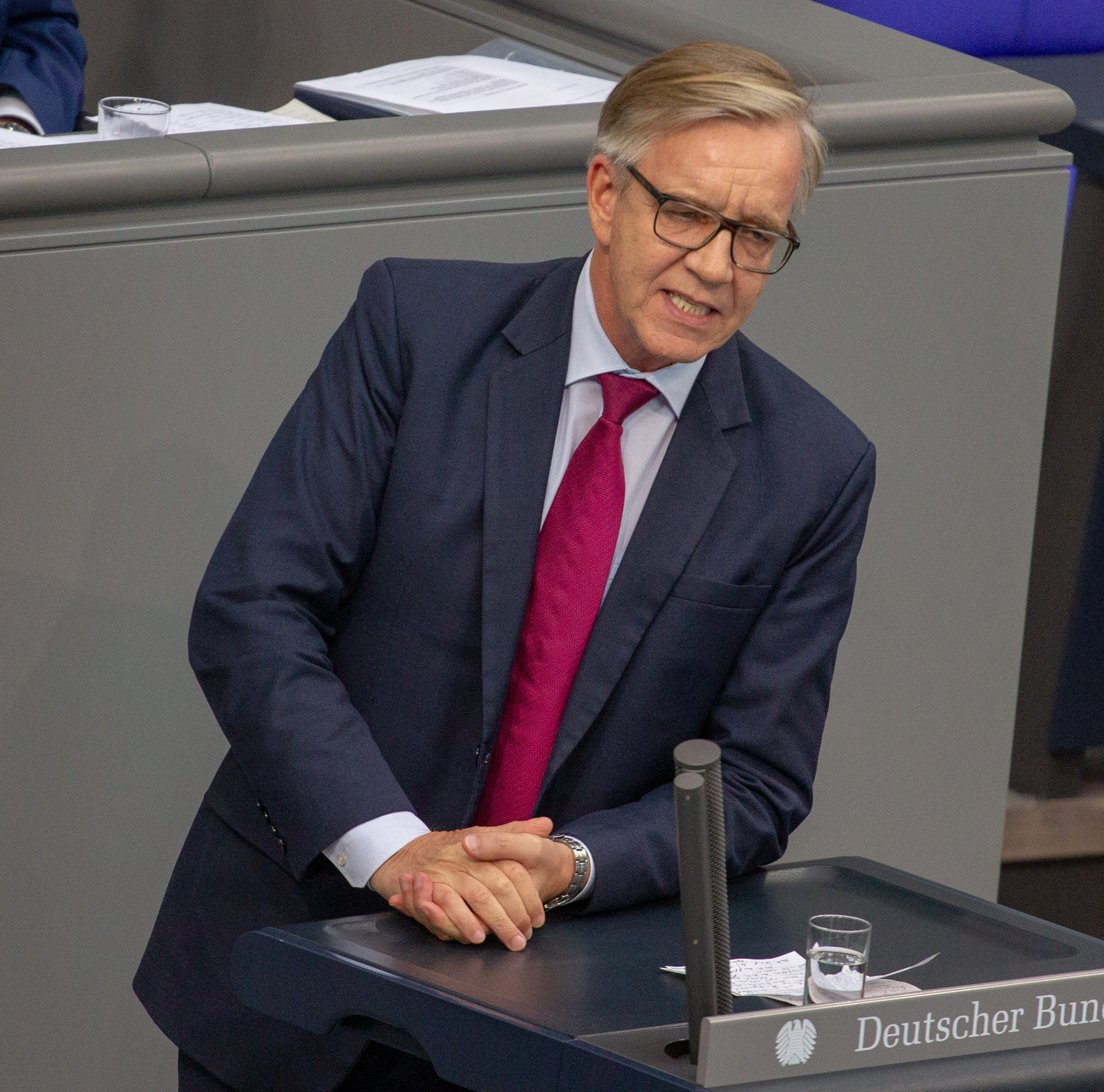 Dietmar Bartsch, Mitglied des Deutschen Bundestages, während einer Plenarsitzung am 10. April 2019 in Berlin.